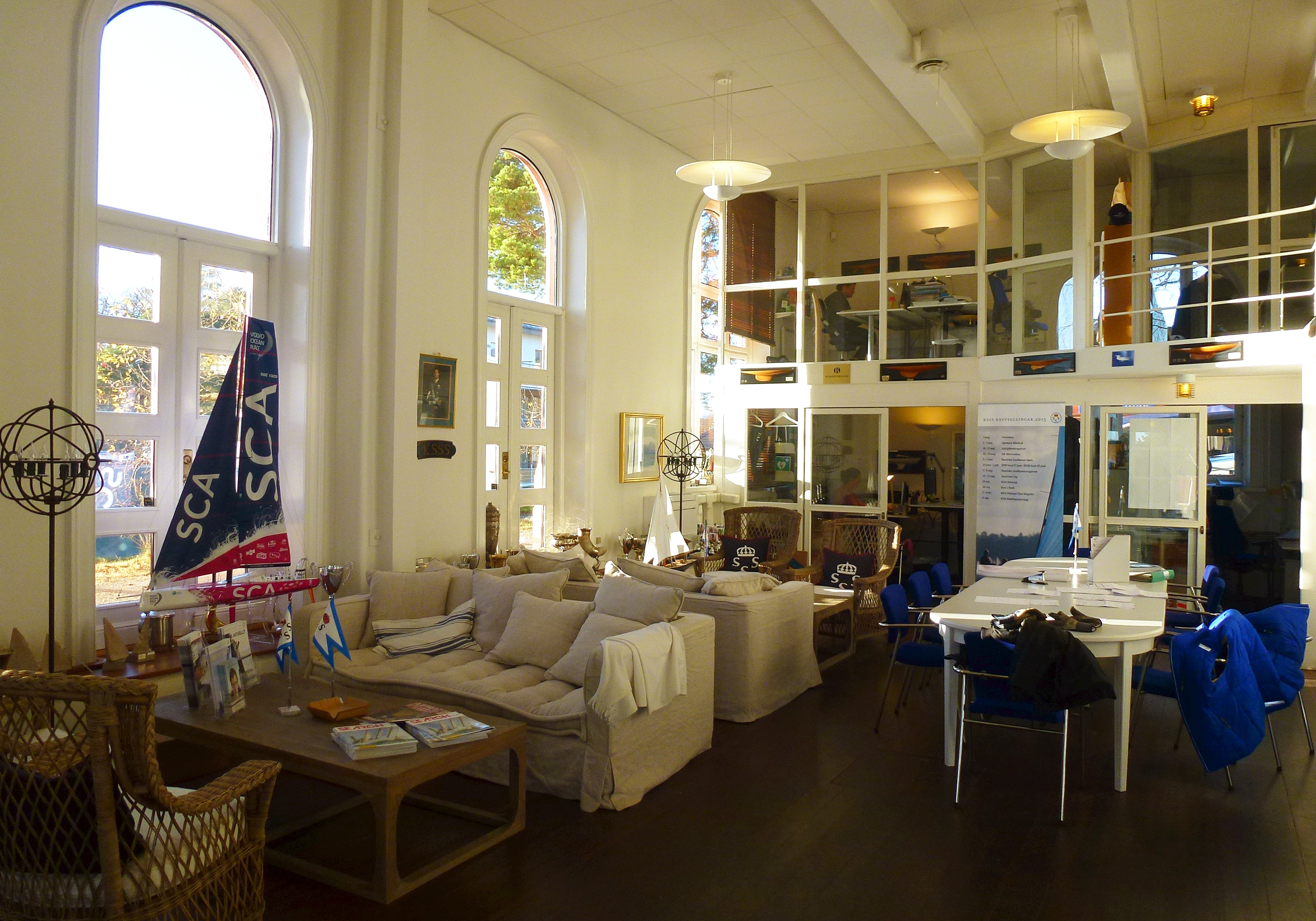 KSSS kansli Saltsjöbaden, f.d. Saltsjöbadens elektricitesverk